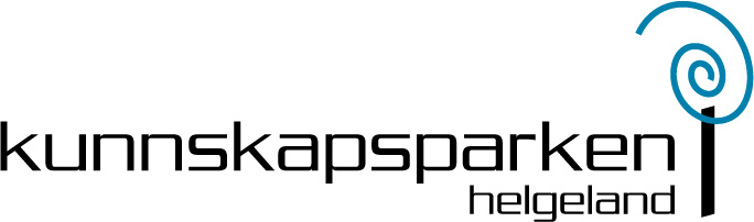 Kunnskapsparkens Logo